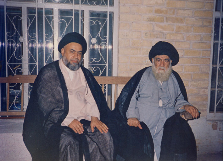 آیت الله فقیه ایمانی درکنار آیت الله العظمی خویی، نجف اشرف.